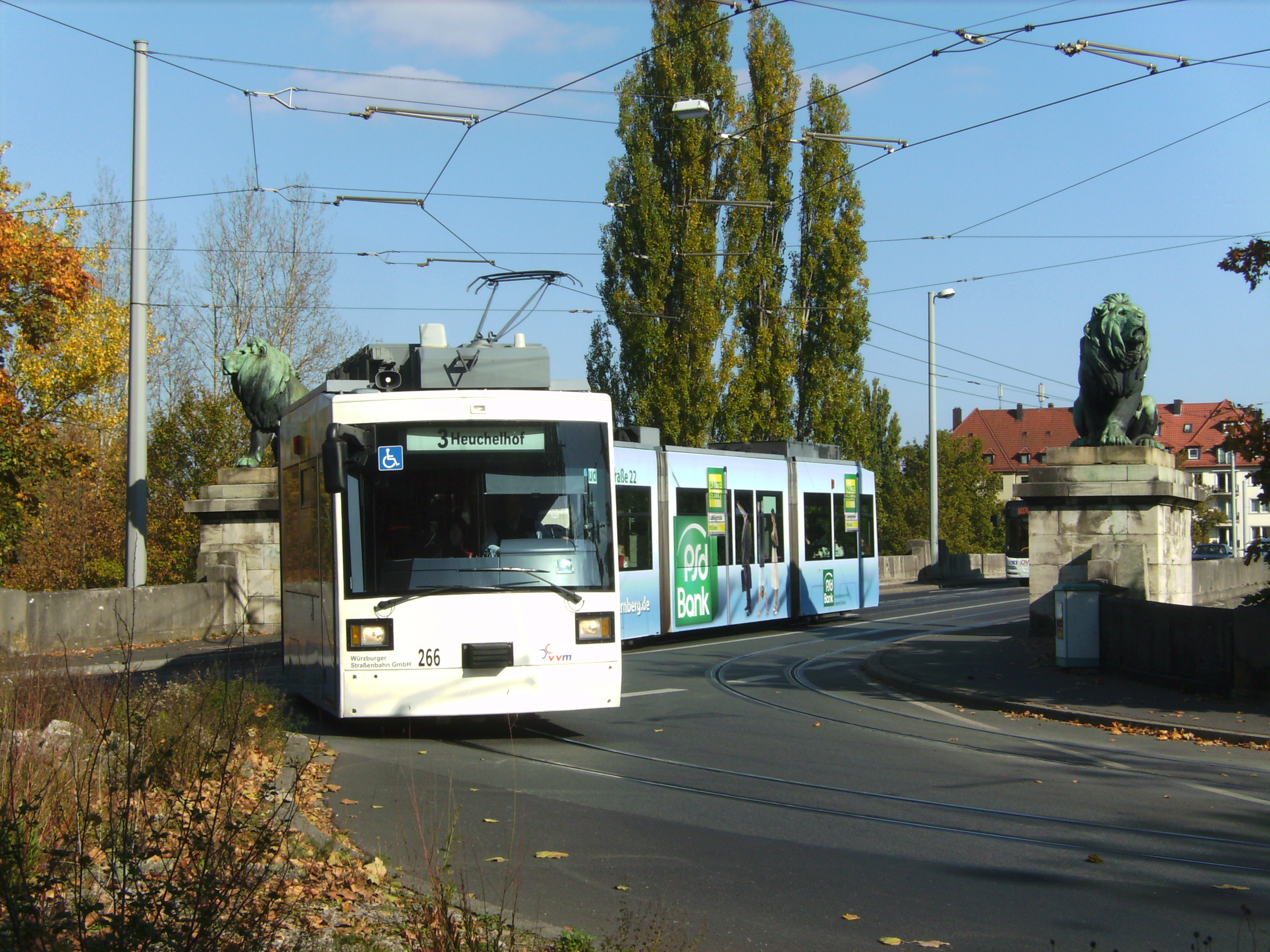 Ein Straßenbahntriebzug des Typs GT-N (Fahrzeugnummer 266) hat soeben die Löwenbrücke überquert und fährt auf die gleichnamige Straßenbahnhaltestelle zu